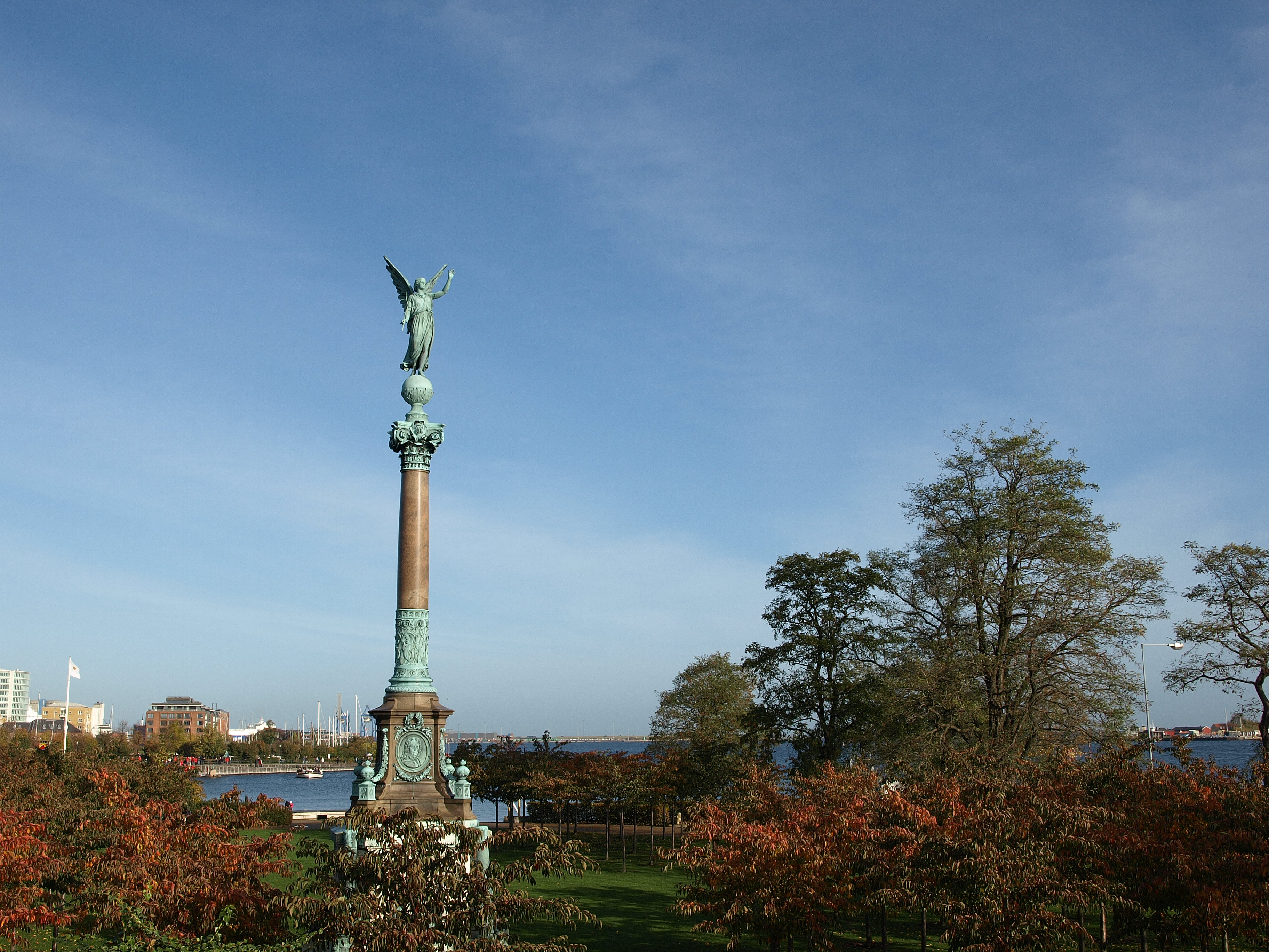 Ivar Hvitfeldt Column at Langelinie in Copenhagen, Denmark